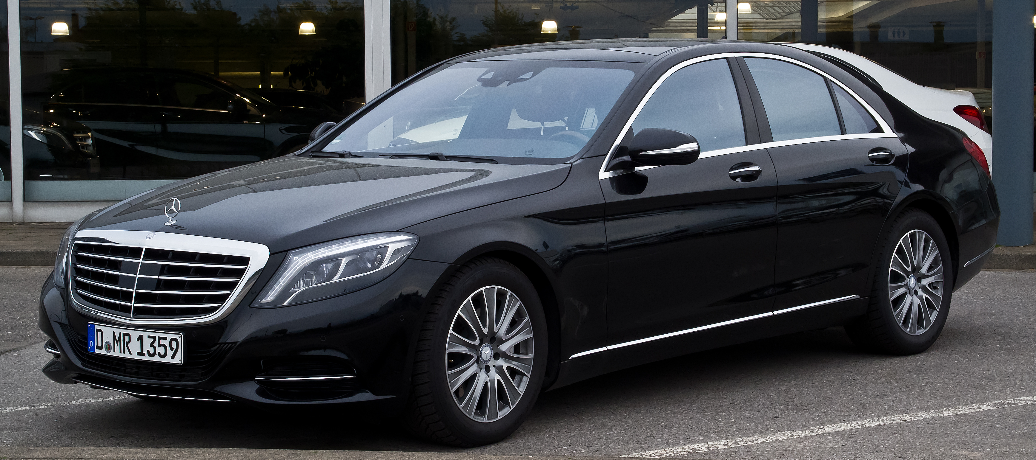 Mercedes-Benz S 500 (W 222)